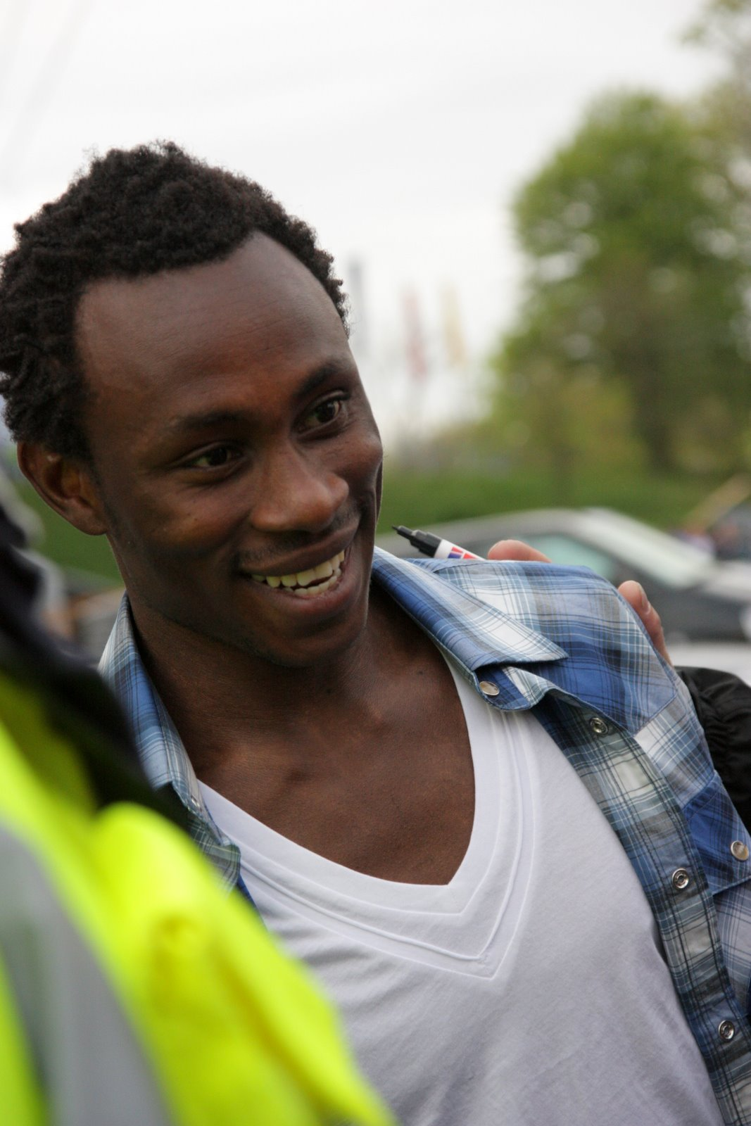 Jonathan Pitroipa nach dem Bundesligaspiel HSV gegen 1. FC Nürnberg